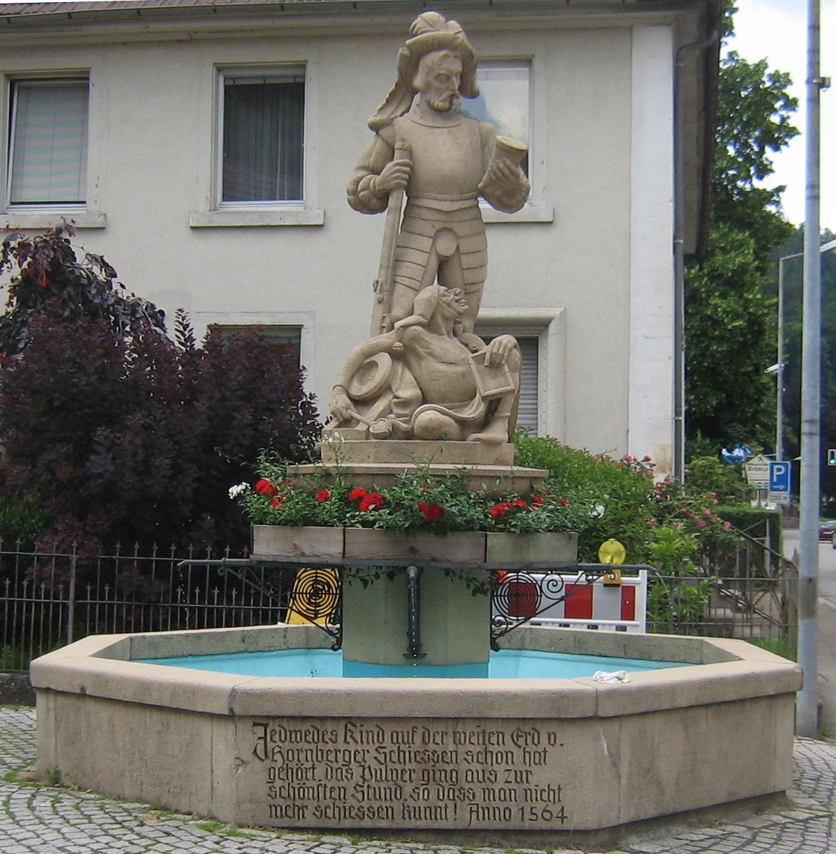 Stadtbrunnen Hornberg mit Landsknecht und Narr - town spring with lansquenet and fool